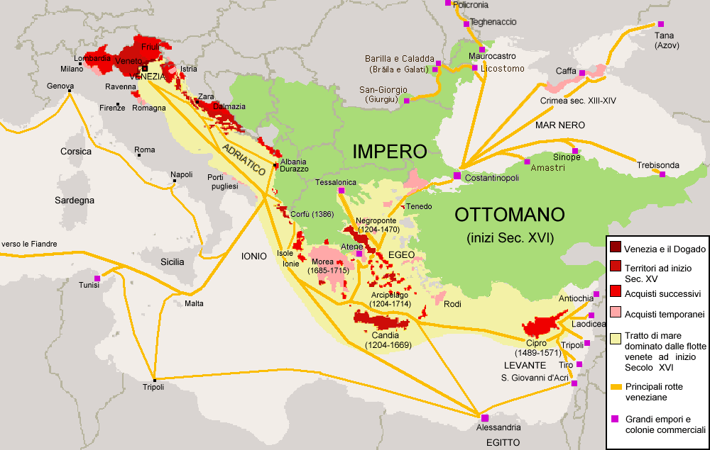 Dominii della Repubblica di Venezia nel XV/XVI secolo.